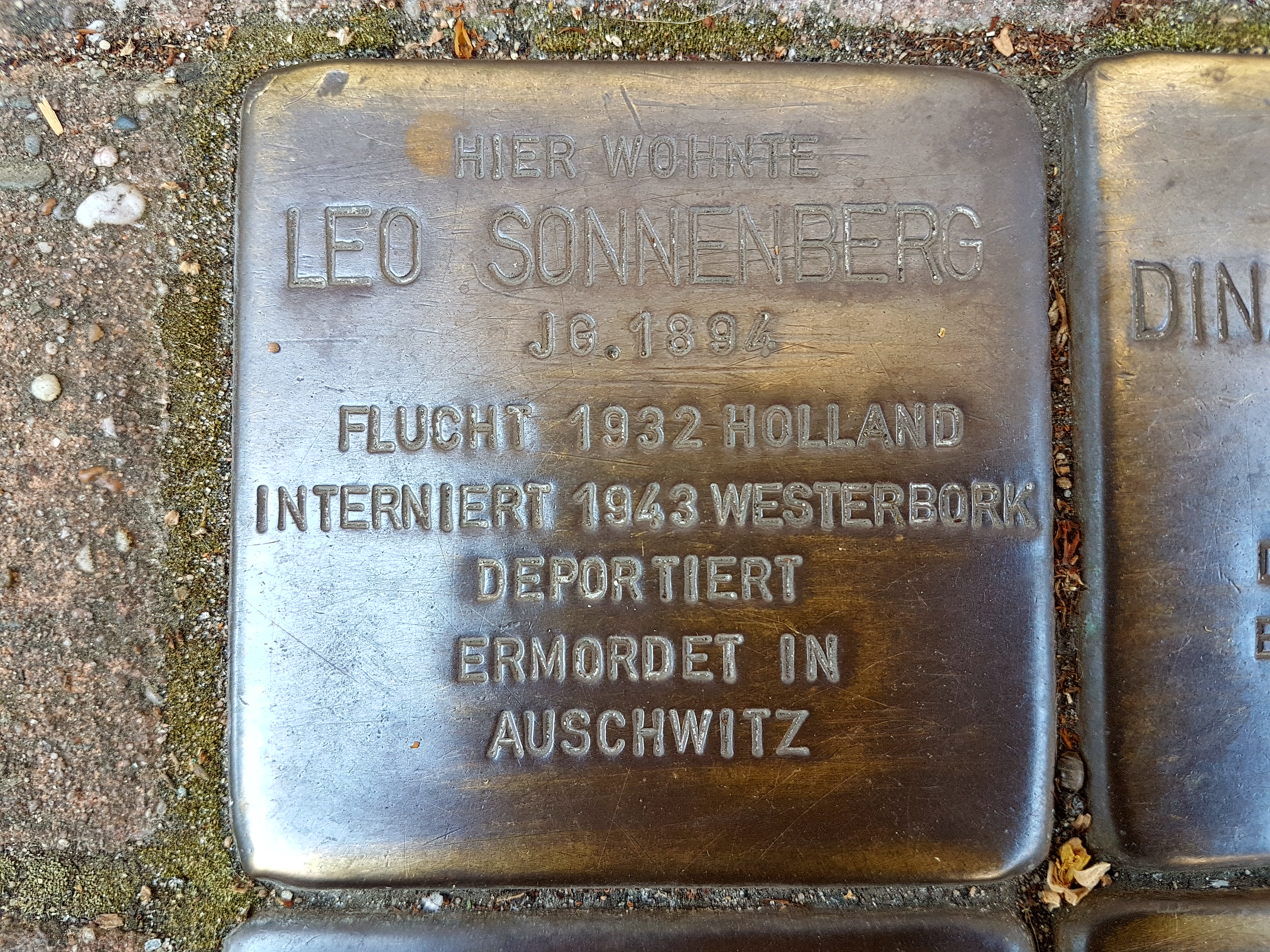 Leo Sonnenberg Stolperstein Duisburg